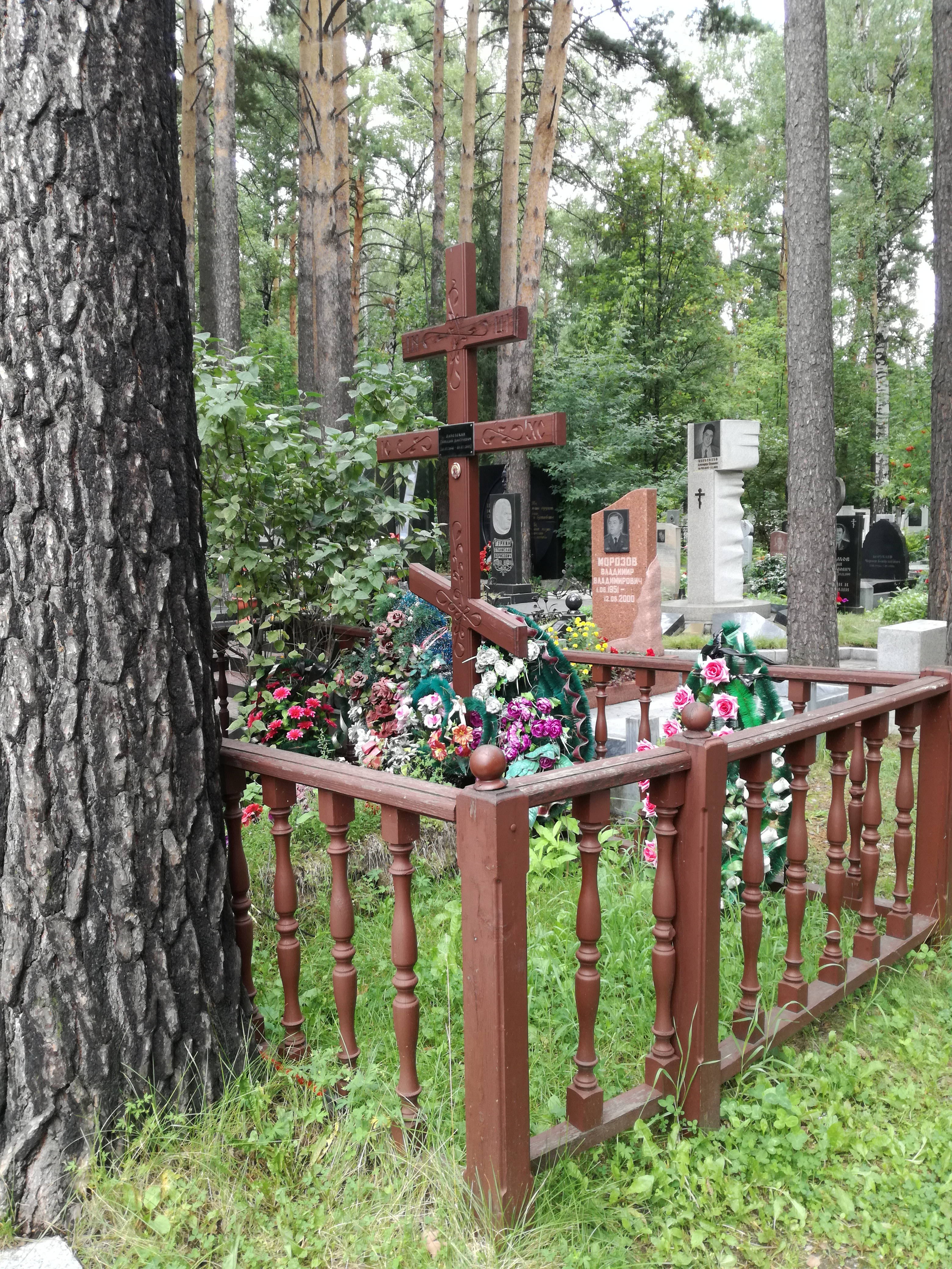 Заельцовское кладбище. Могила Геннадия Заволокина